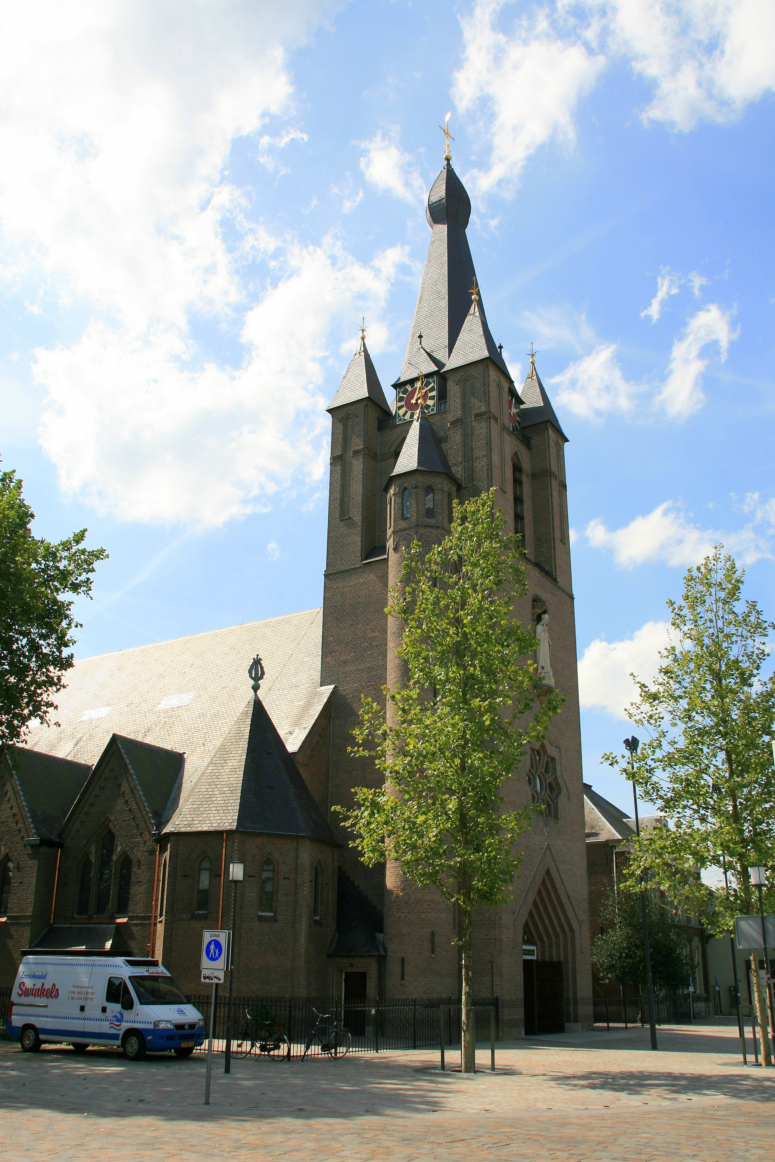 De kerktoren toont een zeer karakteristiek silhouet. De toren heeft twee geledingen met aan de noordzijde een uitgemetselde ronde traptoren met octagonale spits. In deze toren hangt een carillon uit 1959, gegoten door Klokkengieterij Eijsbouts.